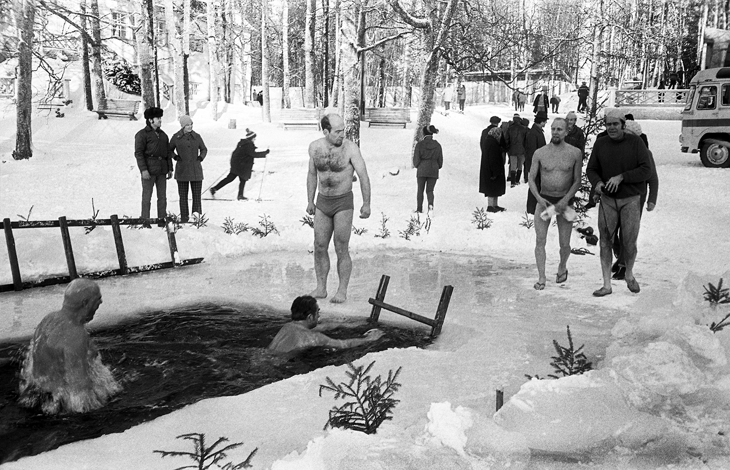 Talisuplus Nelijärve Purgatsi järves 72 (03)